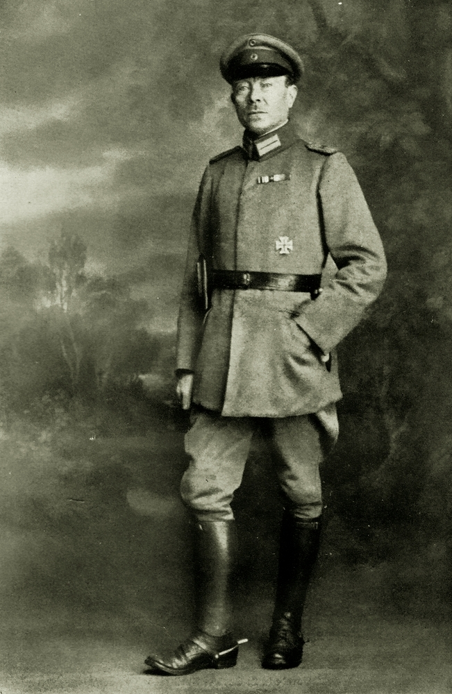 Hauptmann Schneidewind, Kommandeur des Großherzoglich Mecklenburgischen Reserve-Jäger-Bataillons Nr. 14.